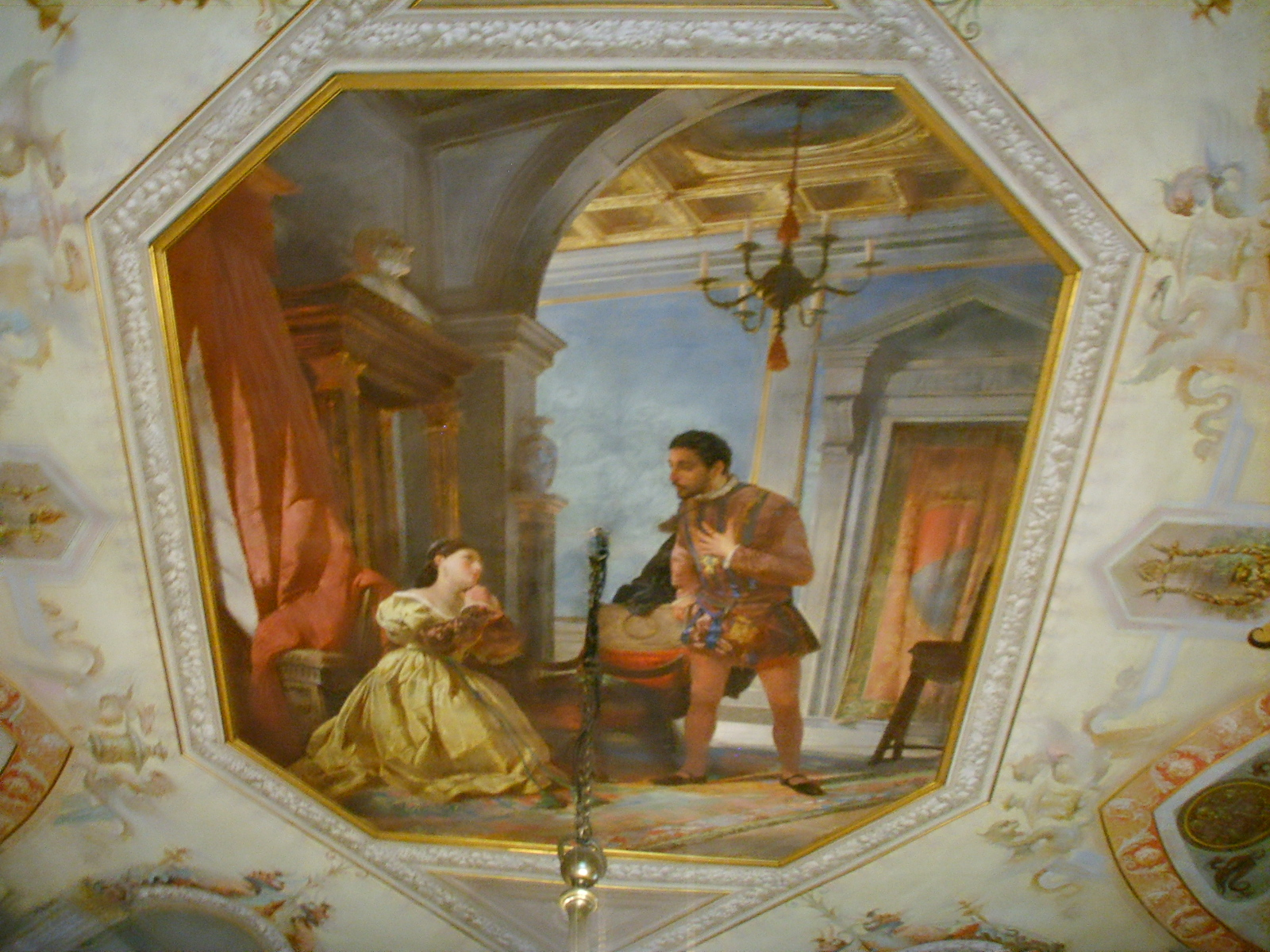 Palazzo sacrati, secondo piano, sala 3, francesco I e bianca cappello 01 Annibale Gatti